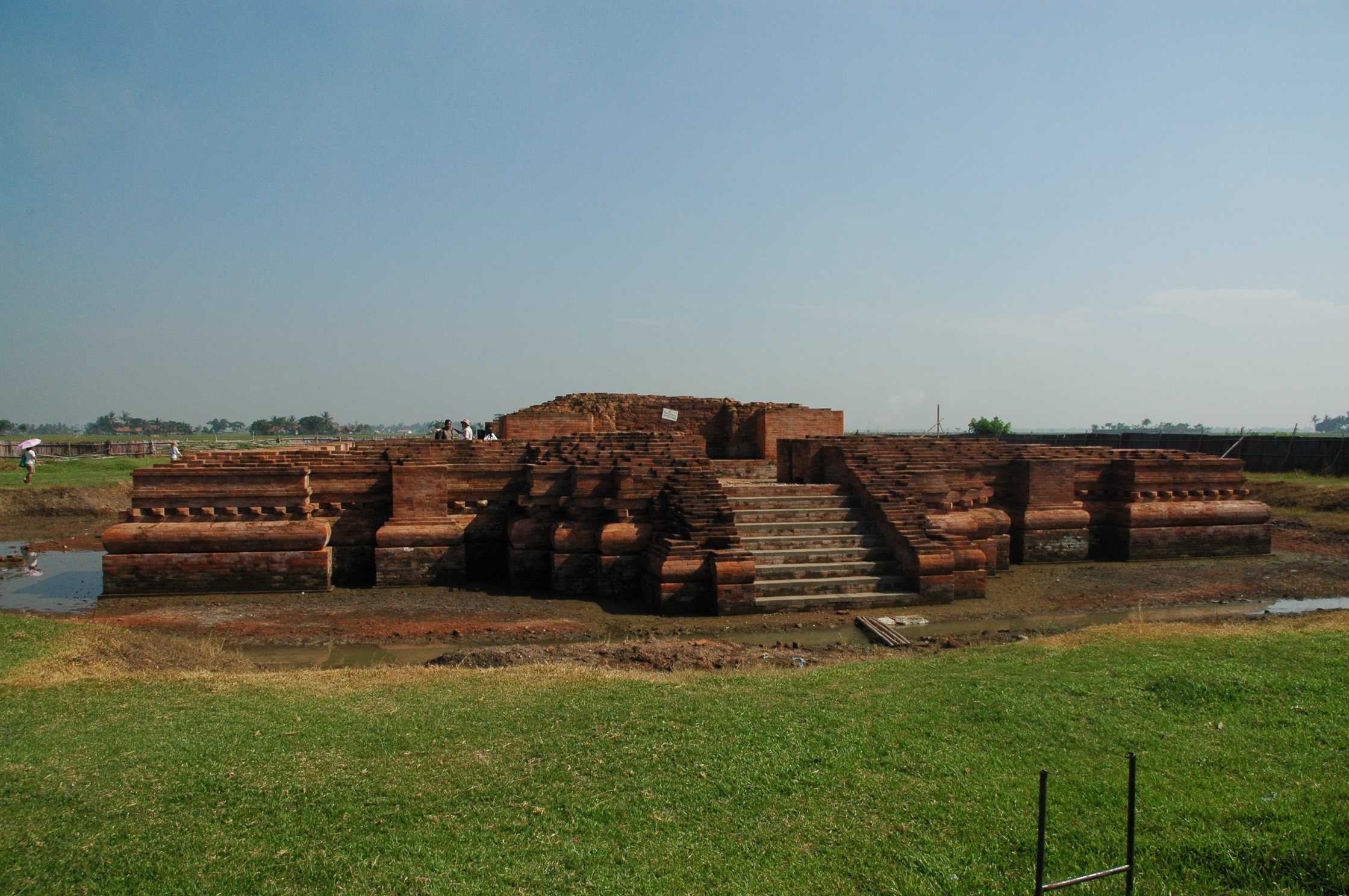 Basa Sunda: Candi Blandongan di situs Batujaya, Karawang.